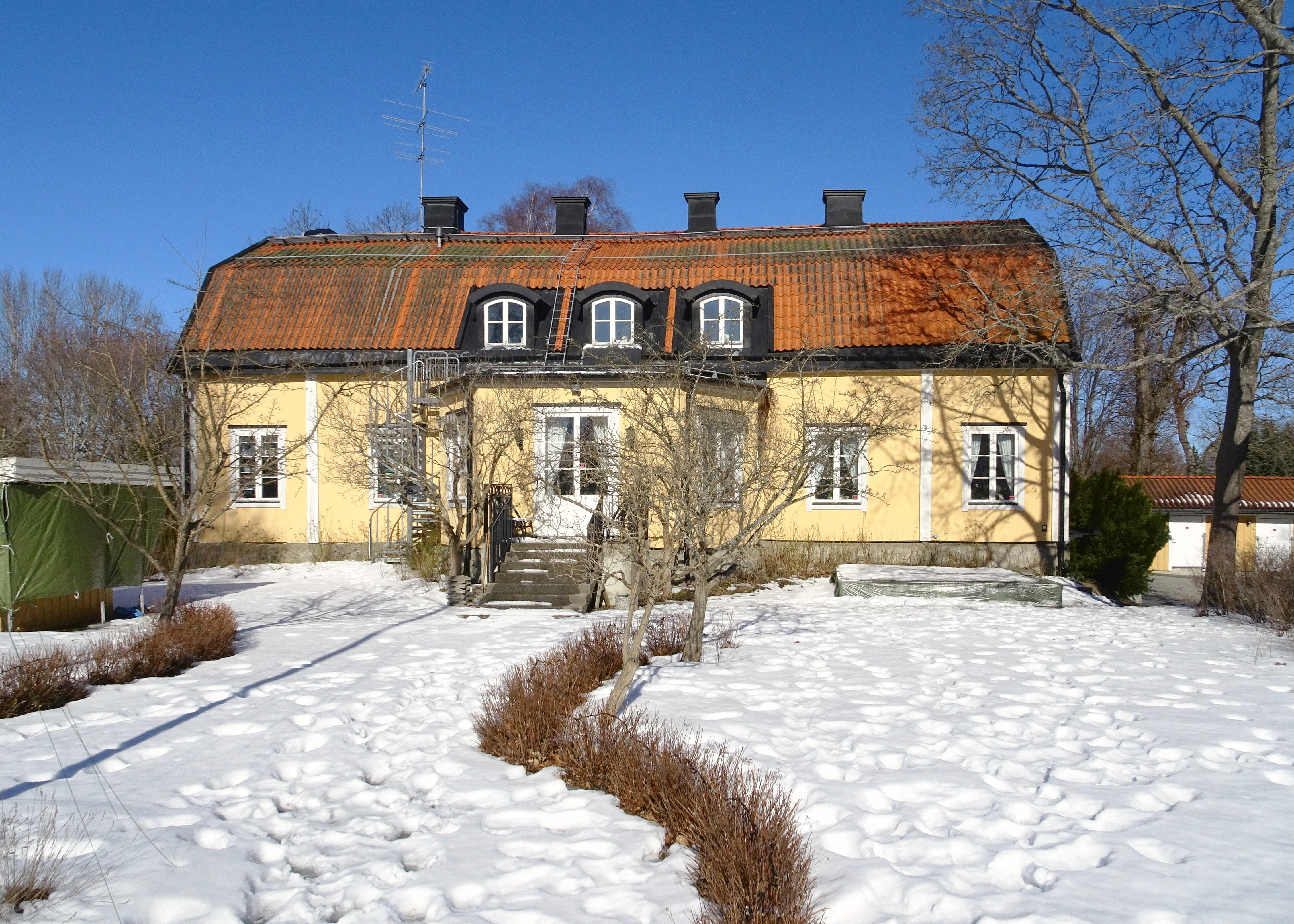 Kumla gård, Tyresö kommun